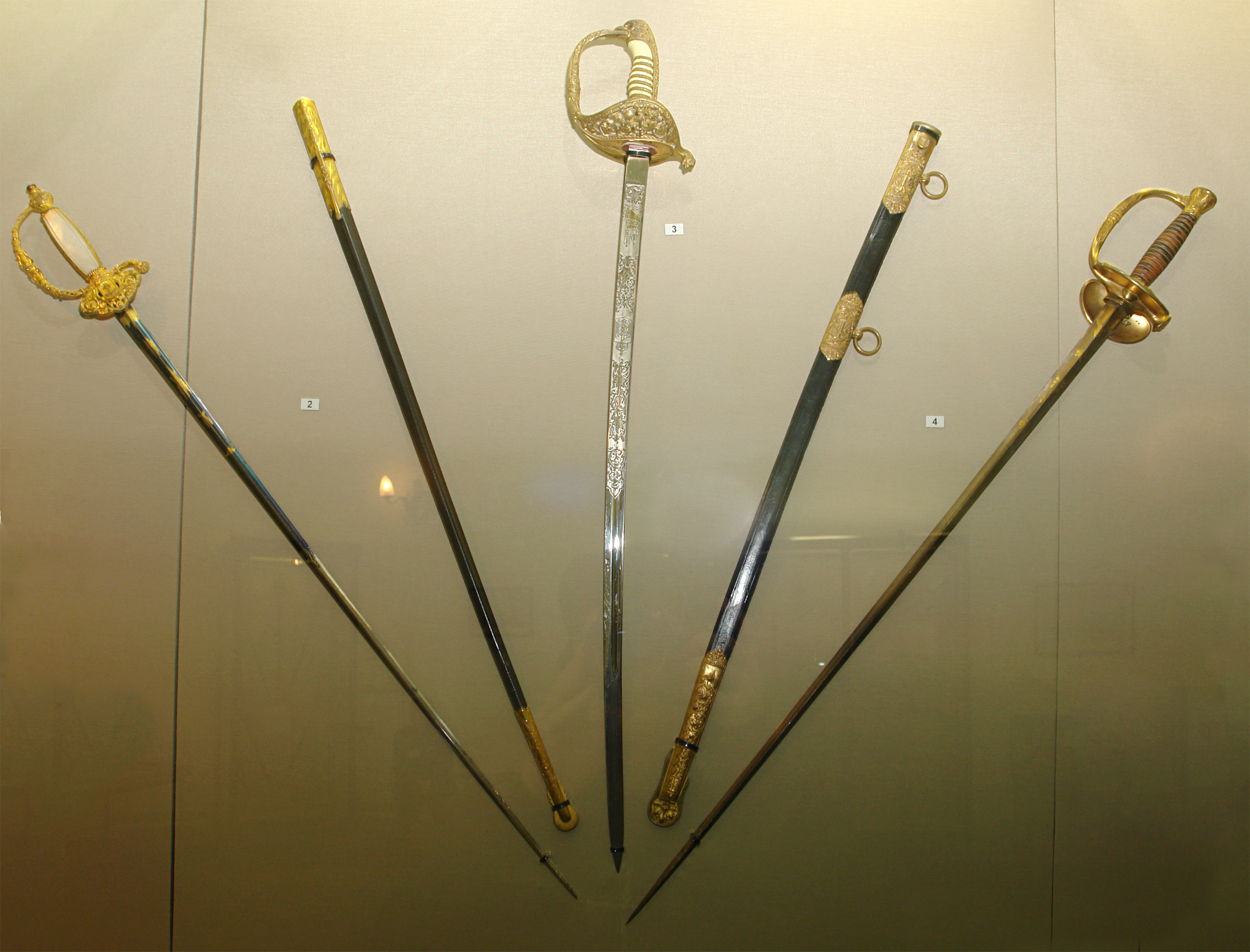 2. Шпага французская морских чиновников периода Второй Империи (1852 - 1870гг.) 3. Сабля испанская морская офицерская периода восстановления монархии (1875 - 1931) 4. Шпага французская морская офицерская обр. 1837 г. Военно-исторический музей артиллерии, инженерных войск и войск связи, Санкт-Петербруг.